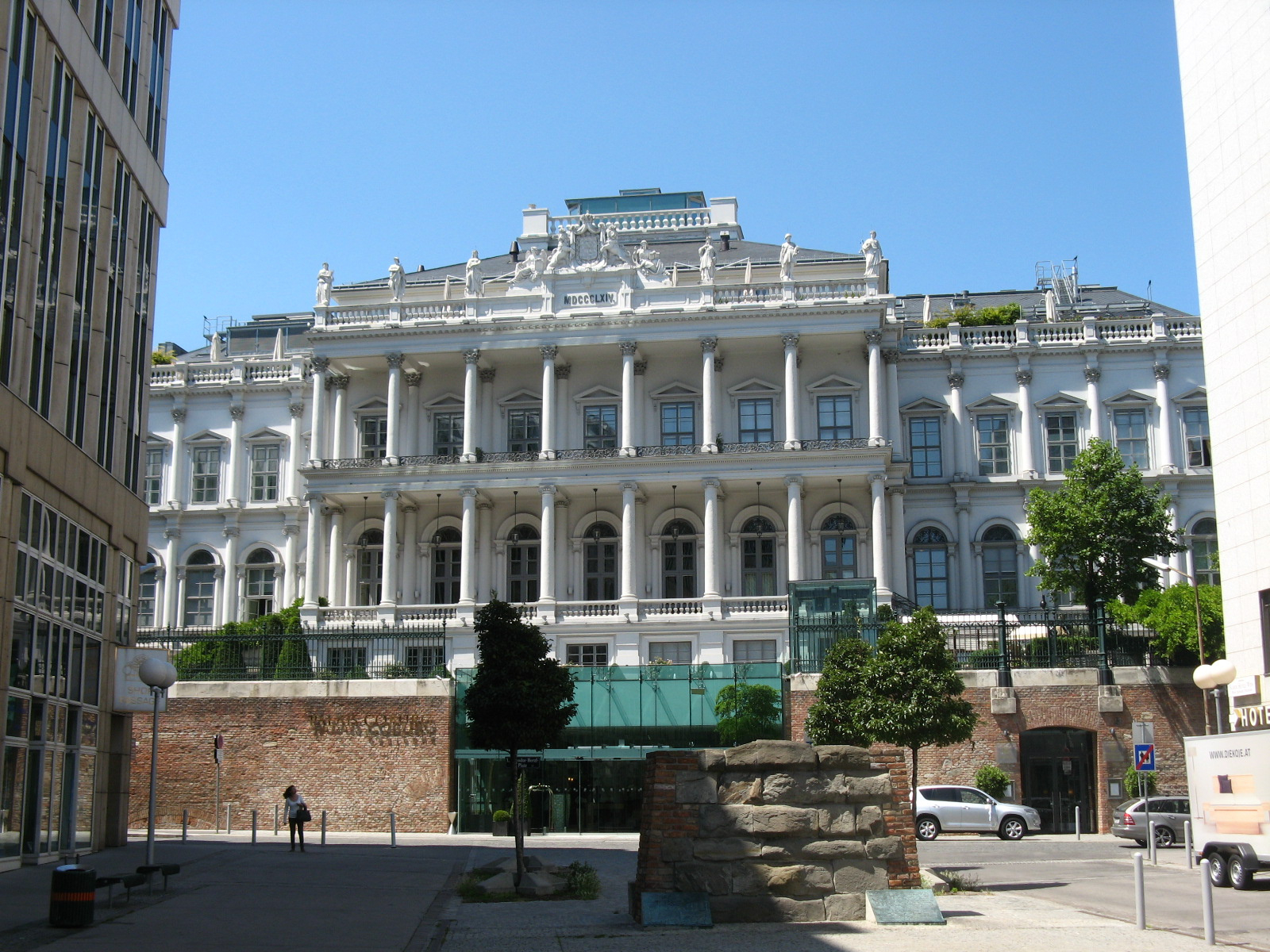 Palais Coburg, Wien-Innere Stadt